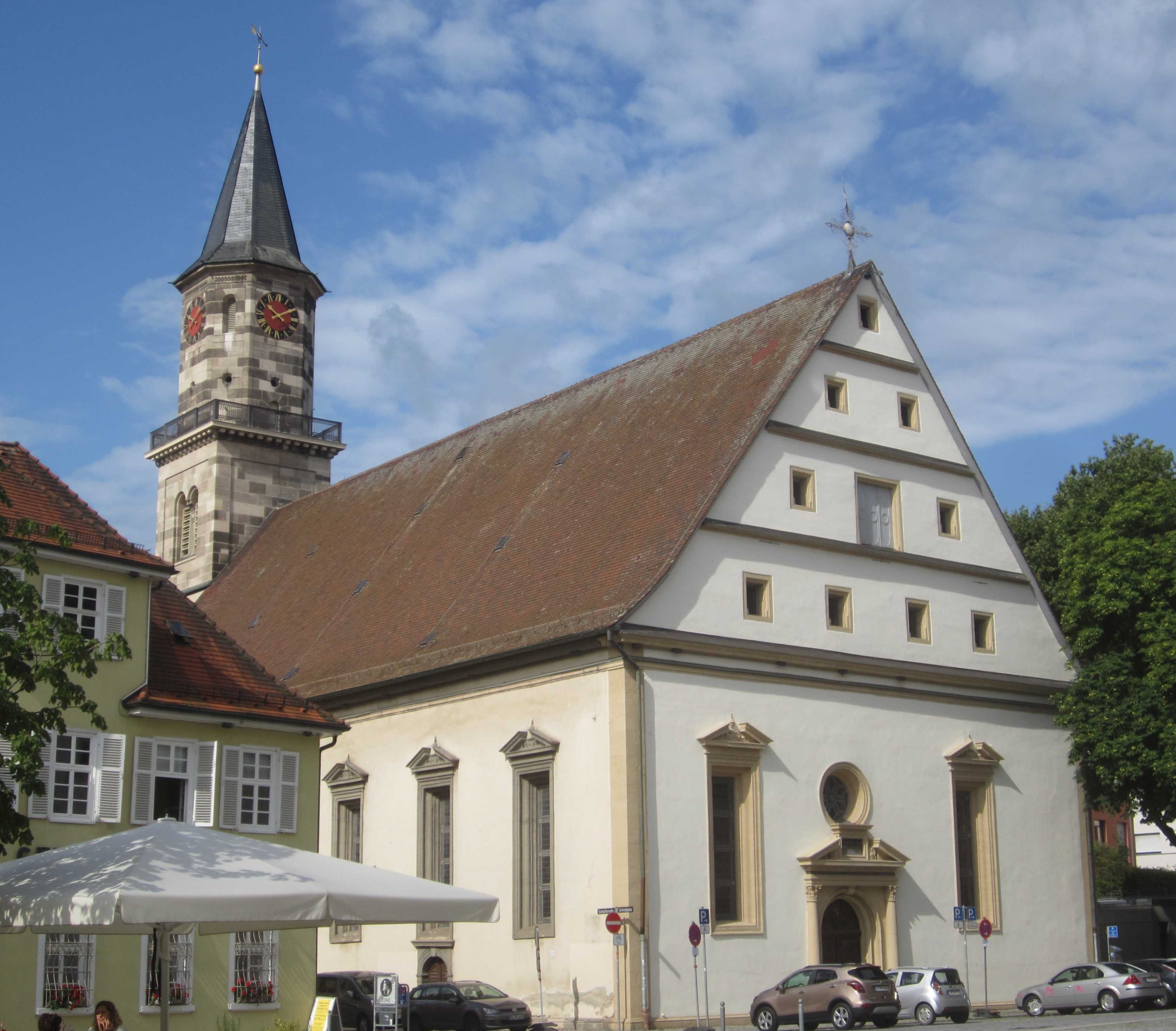 Evangelische Stadtkirche Göppingen, am Schlossplatz